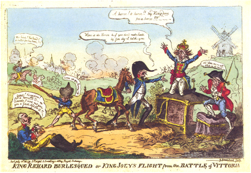 Cruikshank bezieht sich mit diesem Blatt auf den britischen Sieg gegen die Franzosen am 21. Juli 1813 beim nordspanischen Vittoria. Die Kutsche, die Joseph Bonaparte (Napoleon hatte seinen Bruder 1808 zum König von Spanien gemacht) retten soll, bleibt im Schlamm stecken. Auch das Flehen Josephs "My Kingdom for a Horse" (in Anspielung auf Shakespeare) und das Antreiben des Pferdes durch den mit einem Dreschflegel bewaffneten Soldaten hilft nicht.